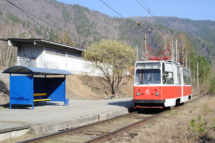 71-88G 6 in Tscherjomuschki